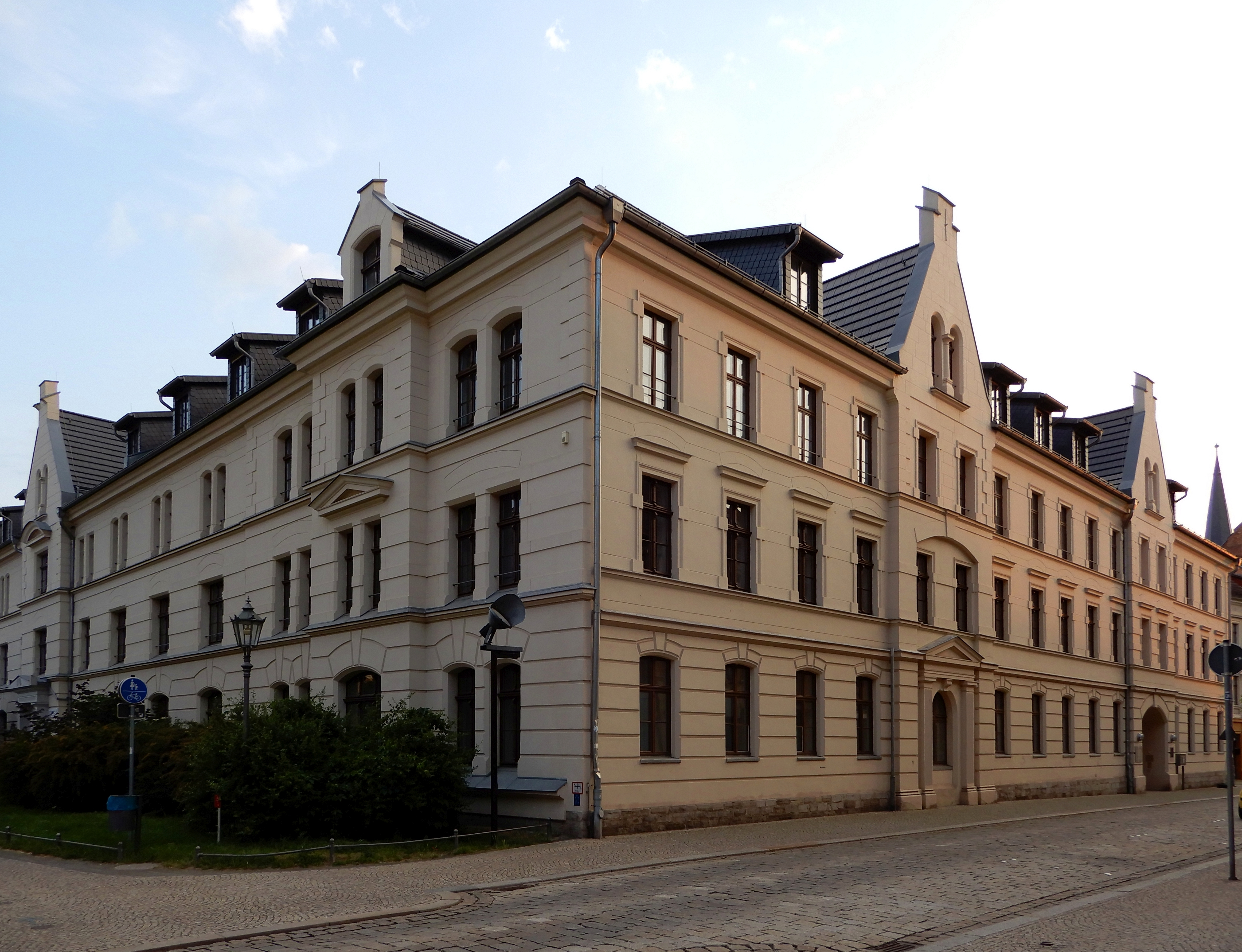 Gebäude Breite Straße 22 in Aschersleben